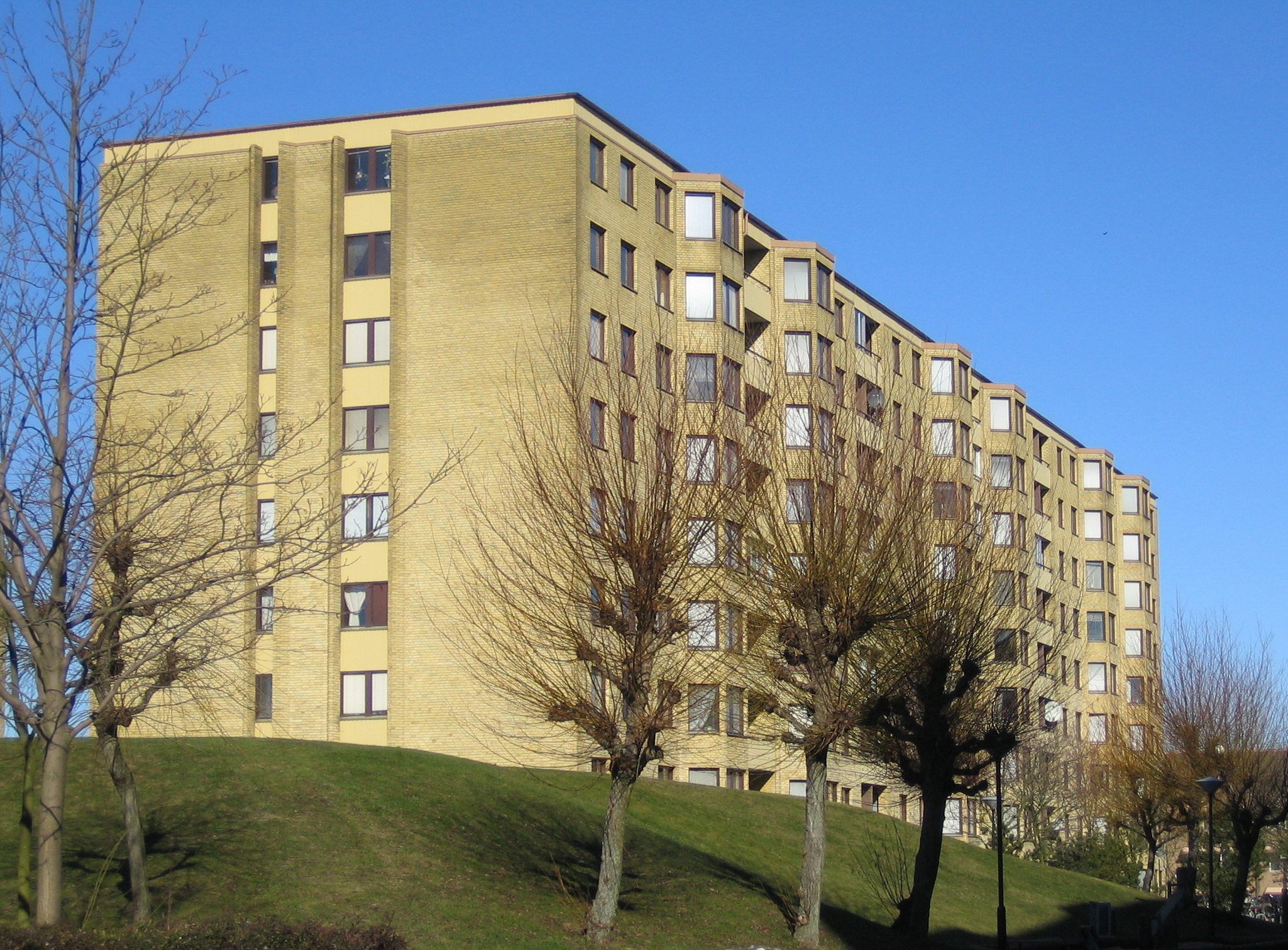 Apartment block in Bellevuegården, Malmö, Sweden